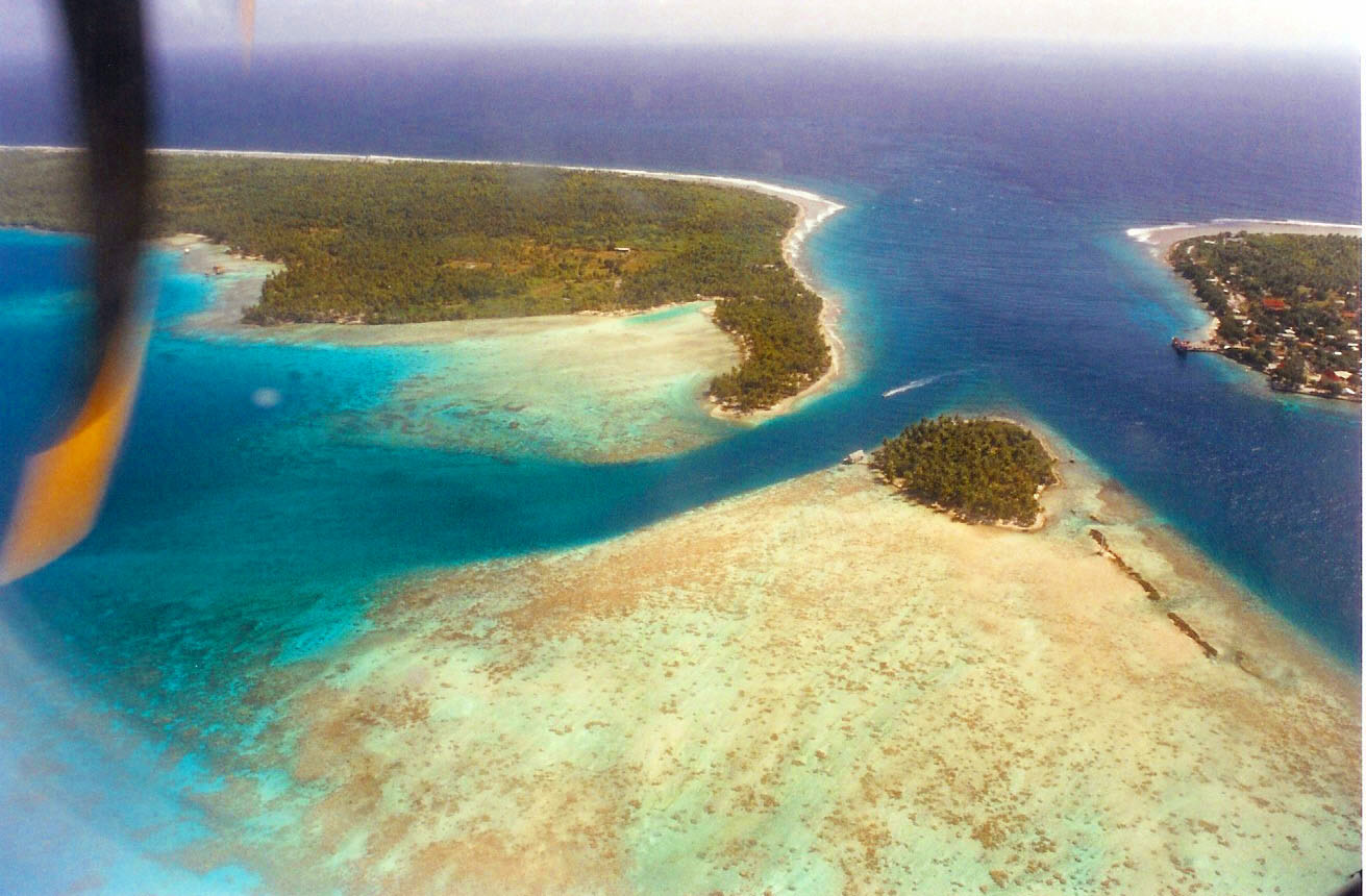 Passe d'Avatoru (Rangiroa) vue d'avion.